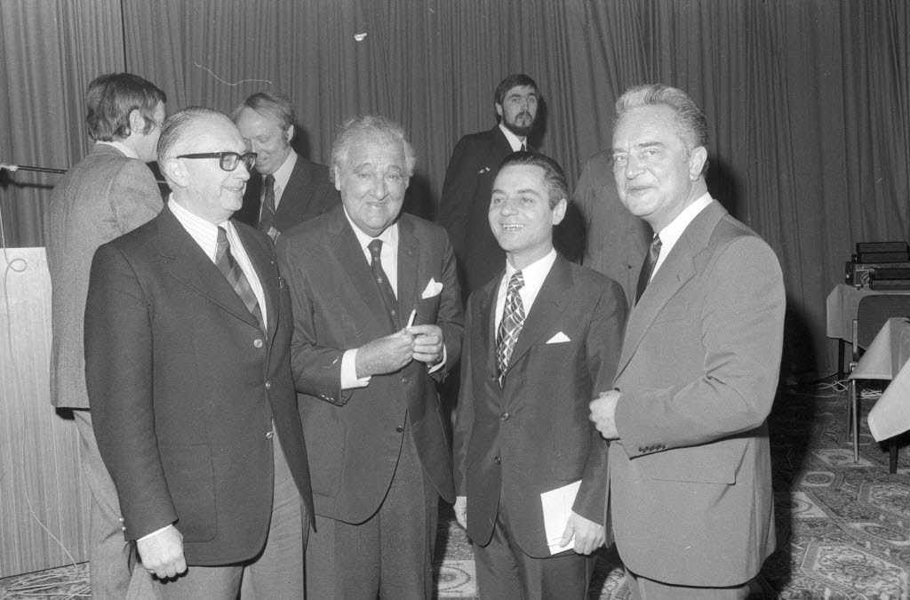 im Hotel Maritim. Der 70-jährige Urologe Prof. Peter Bischoff (2.v.l.), Goldmedaillengewinner in der Starbootklasse bei den olympischen Segelregatten in Kiel 1936 und Gründer der Vereinigung Norddeutscher Urologen wird besonders gewürdigt. Im Bild v.l.n.r.: Präsident der Deutschen Gesellschaft für Urologie Prof. Egbert Schmiedt, Prof. Peter Bischoff, Kultusminister Walter Braun, Vorsitzender der Urologen-Vereinigung Prof. Heribert Wand.